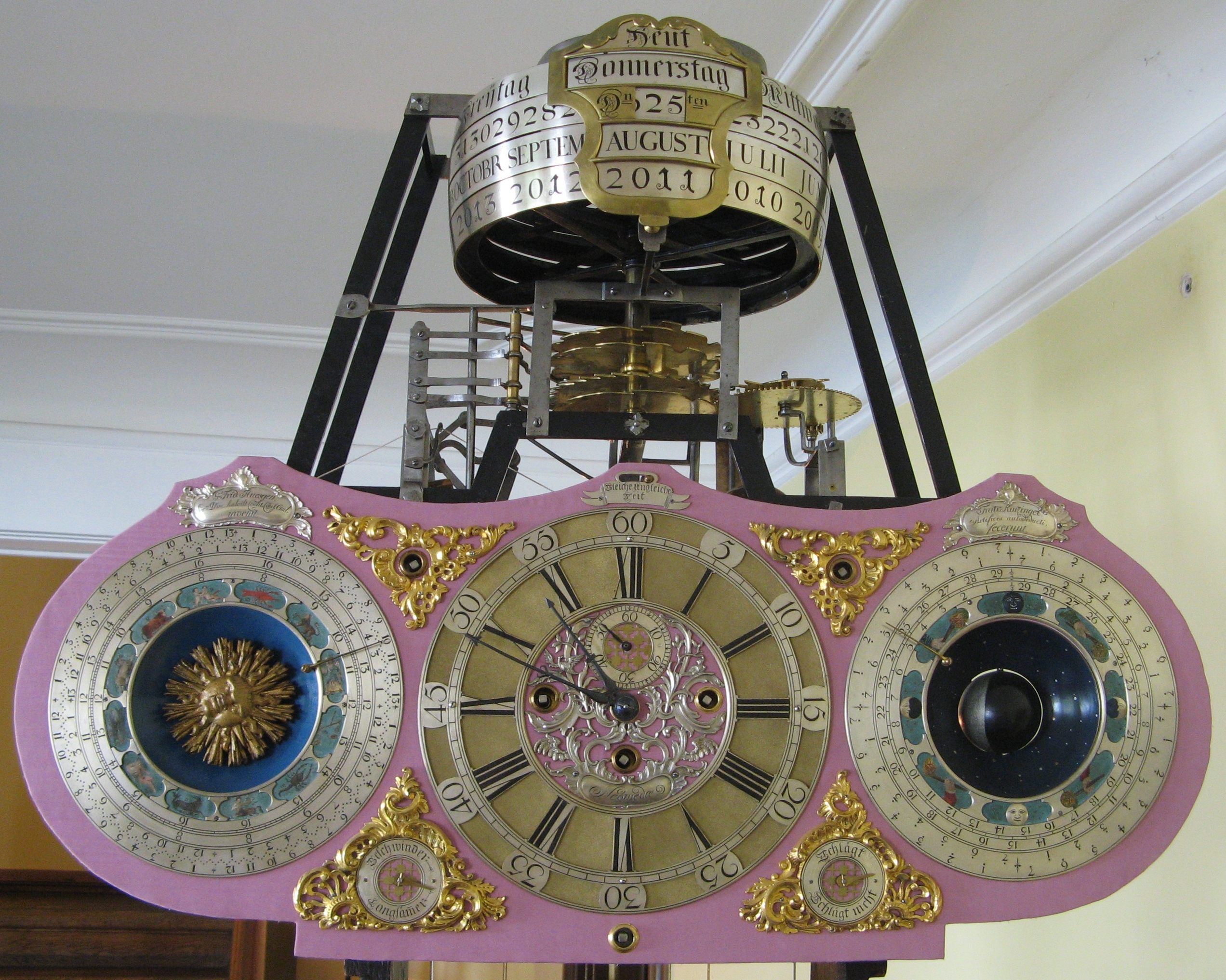 Huesgen-Uhr, Indikationen